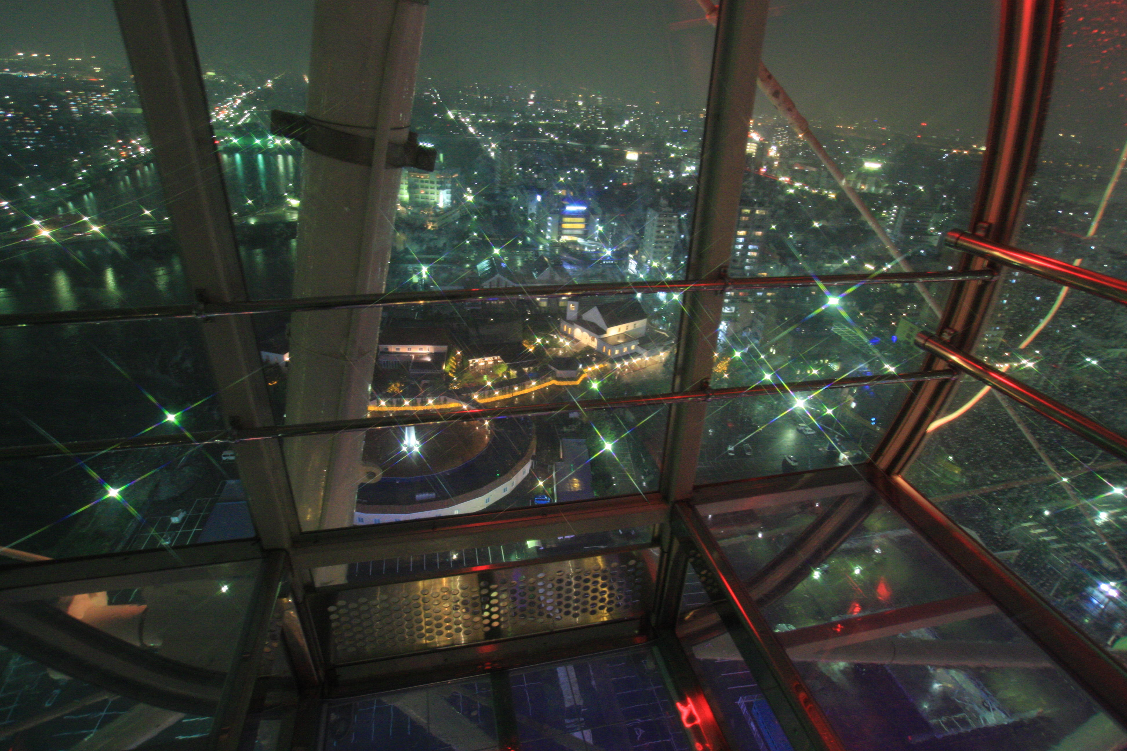 名古屋港シートレインランド 大観覧車のシースルーゴンドラから見た夜景